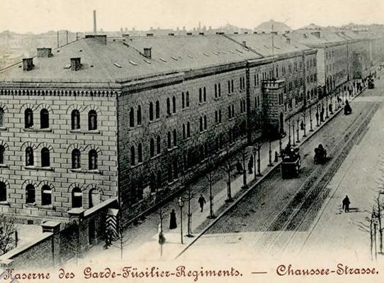 Kaserne der Garde-Füssiliere in Berlin